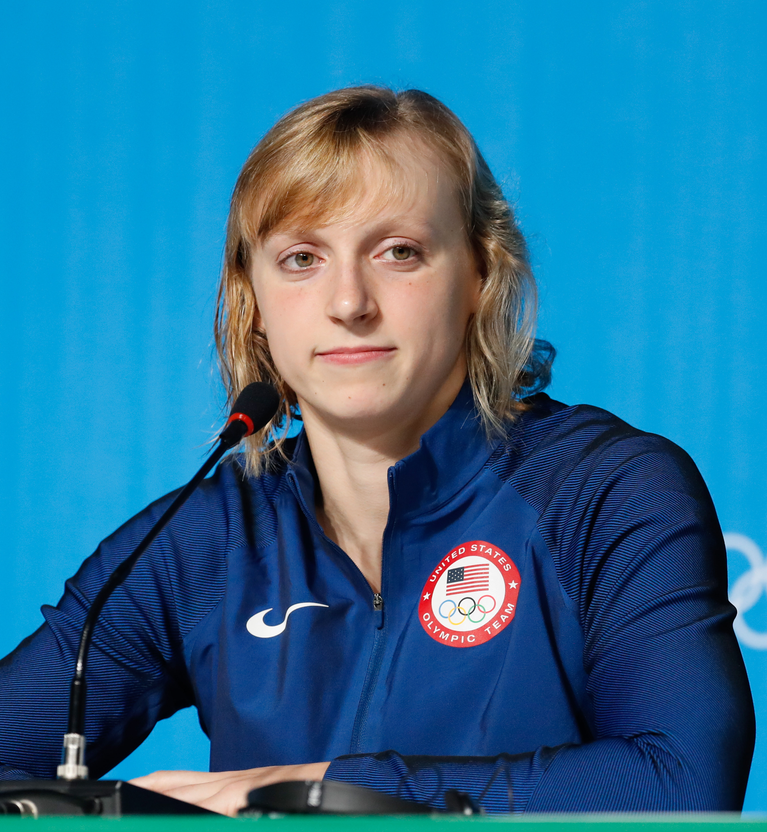 Rio de Janeiro - A nadadora norte-americana Katie Ledecky, medalhista de ouro em Londres, concede entrevista no Parque Olímpico dos Jogos Rio 2016 (Fernando Frazão/Agência Brasil)